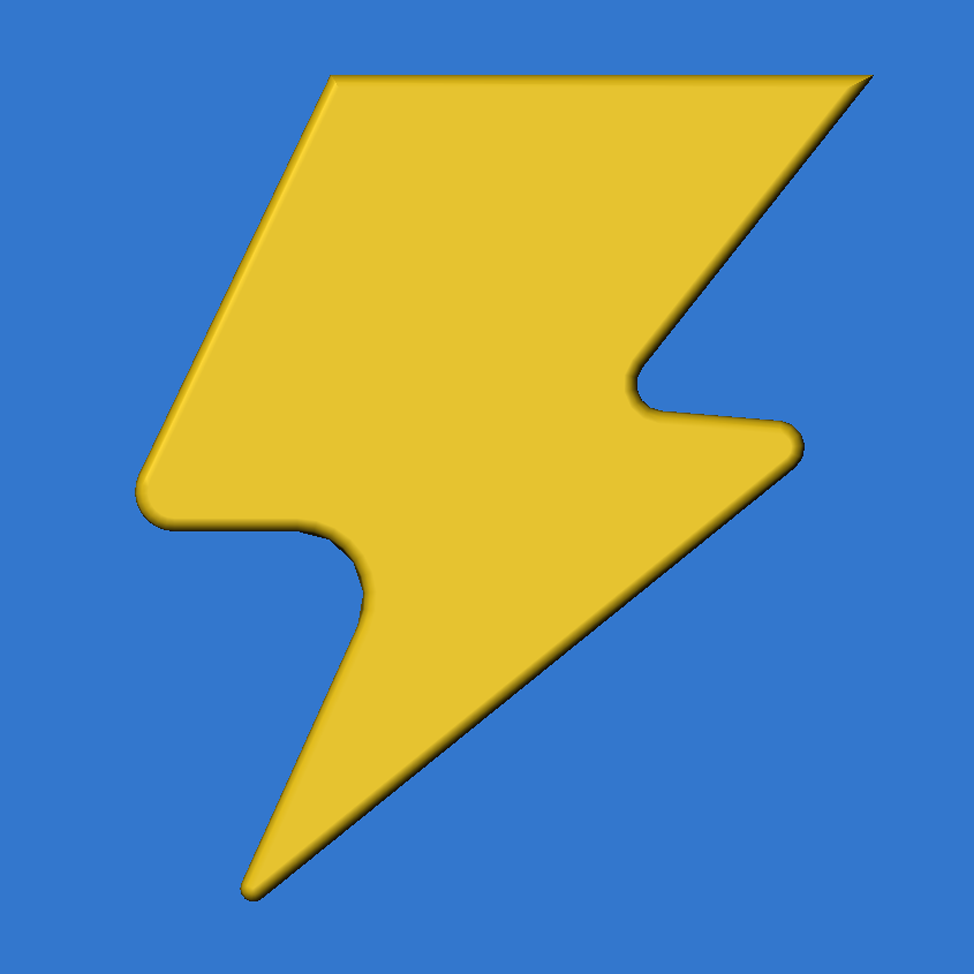 Banner der Charakterfigur Jerome aus der Zeichentrickserie Super Wings.